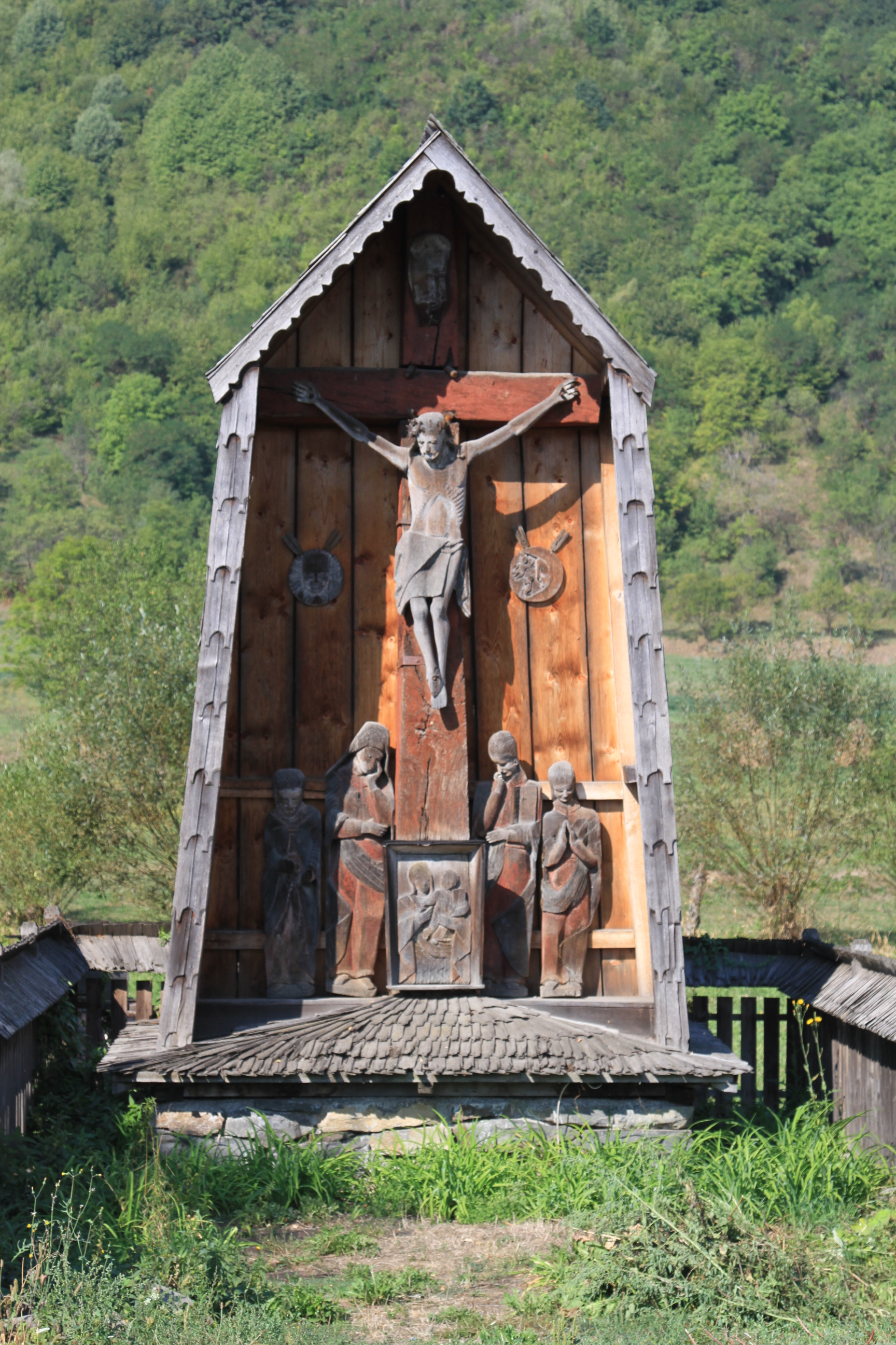 Troiță de lemn